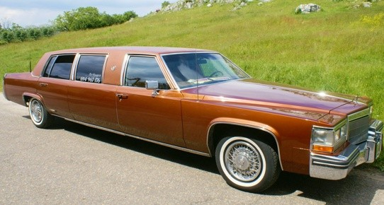 Cadillac Fleetwood Brougham Limuzyna 1983